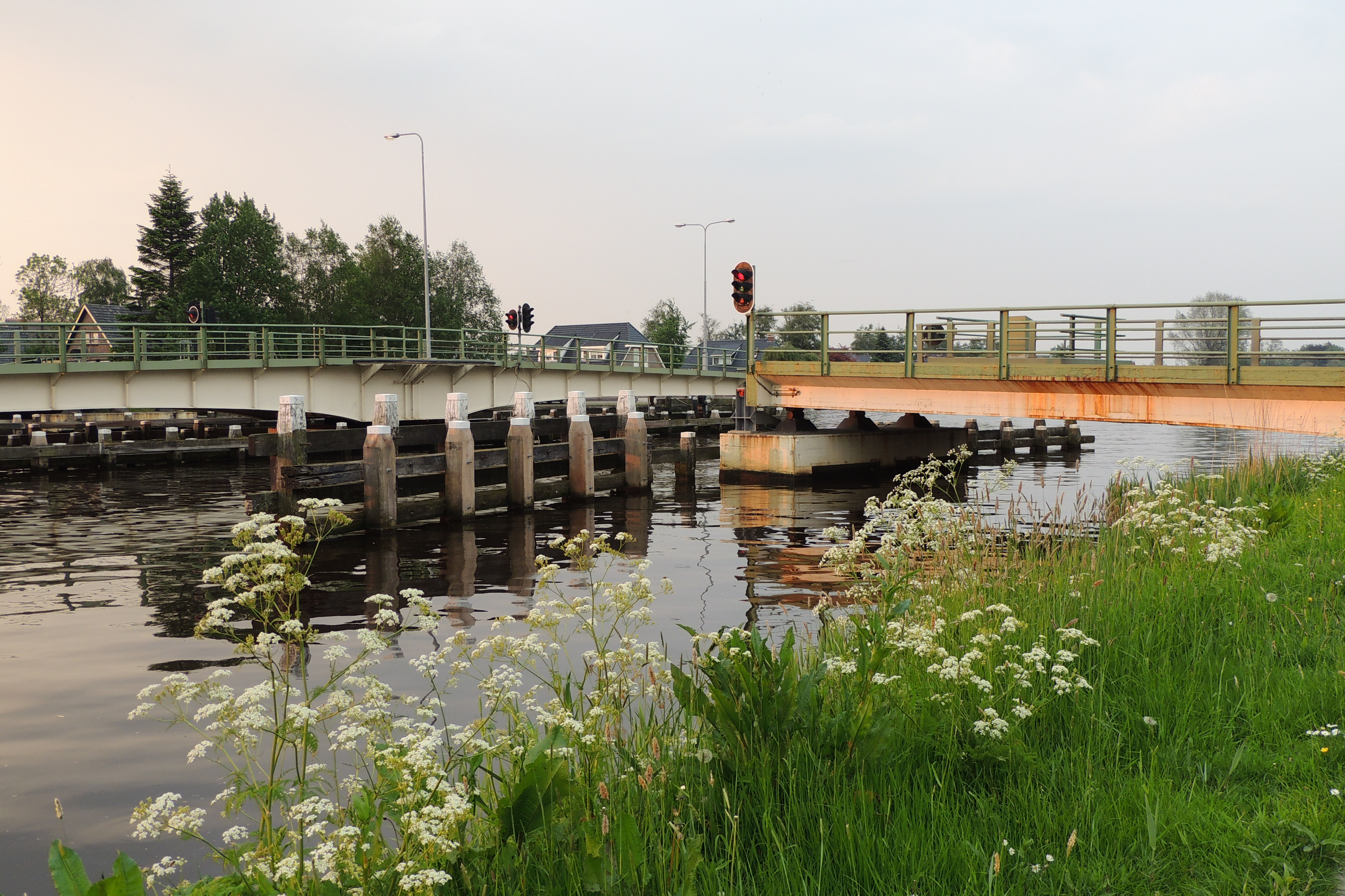 Kapotte brug van Skûlenboarch in het P.M.Kanaal.2